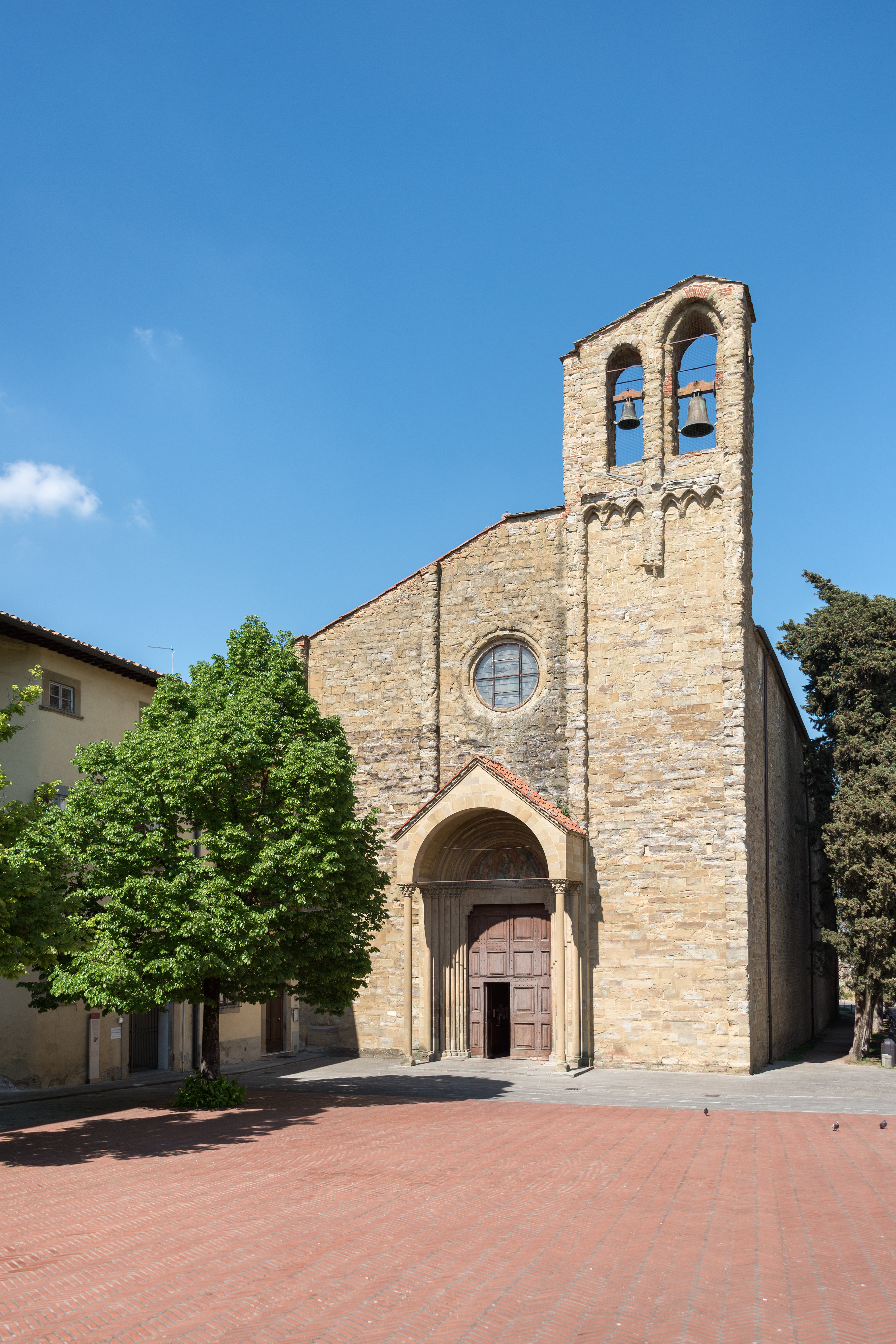 Chiesa di San Domenico - Arezzo, Italia